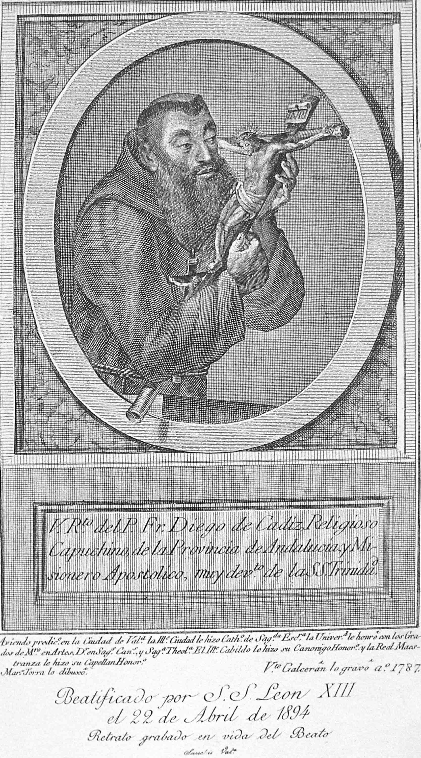 Retrato de Diego José de Cádiz